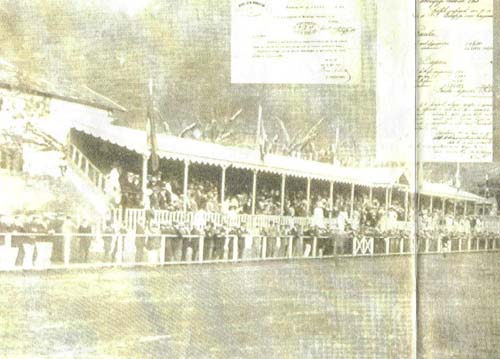 Foto do Estádio da Rua Voluntários da Pátria no ano 1909. O local era sede do Botafogo de Futebol e Regatas.